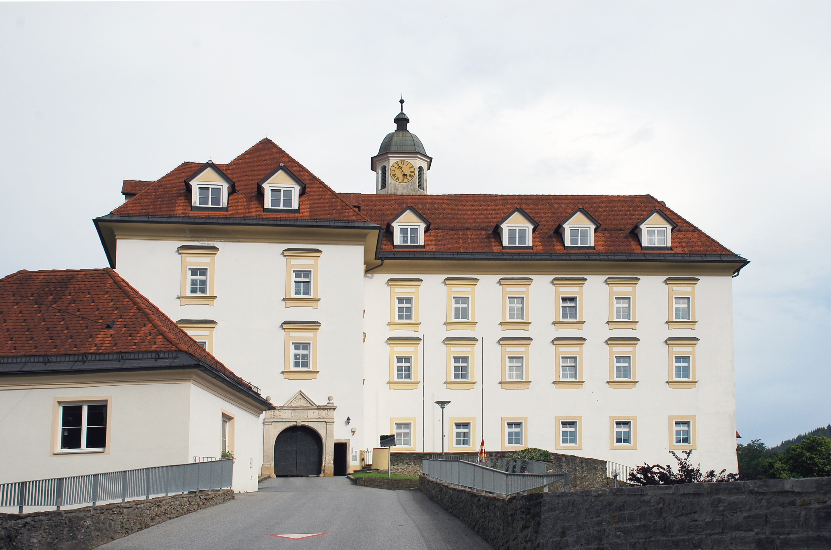 Schwanberg, Steiermark, Österreich: Westfront des Schlosses